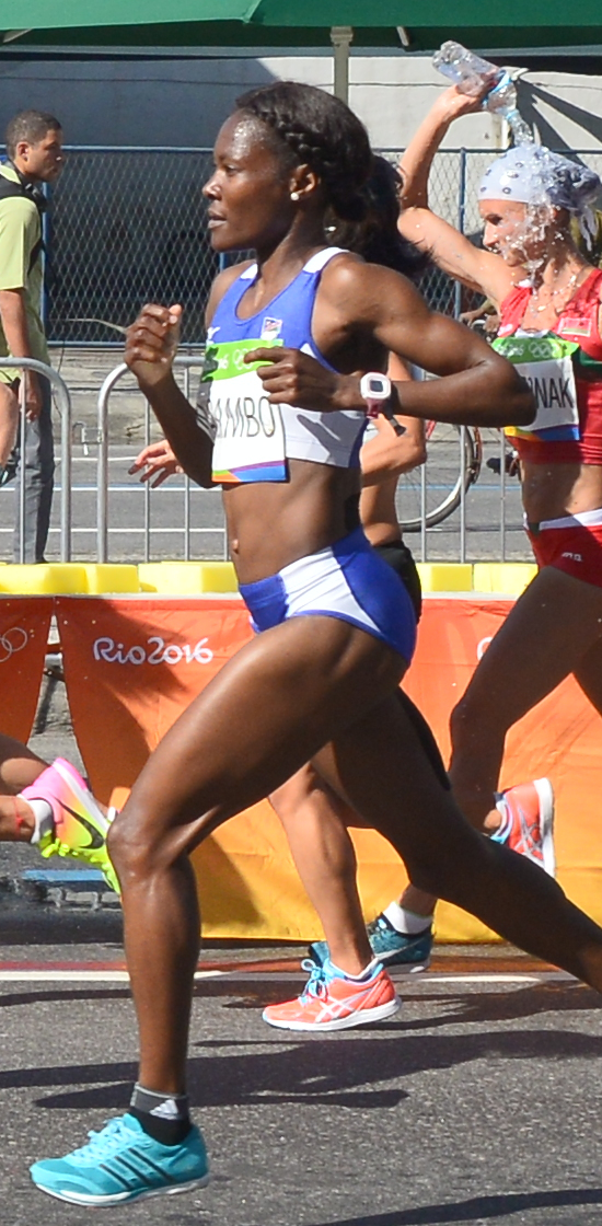 Passage du marathon des jeux olympiques de Rio 2016 dans le centre de Rio